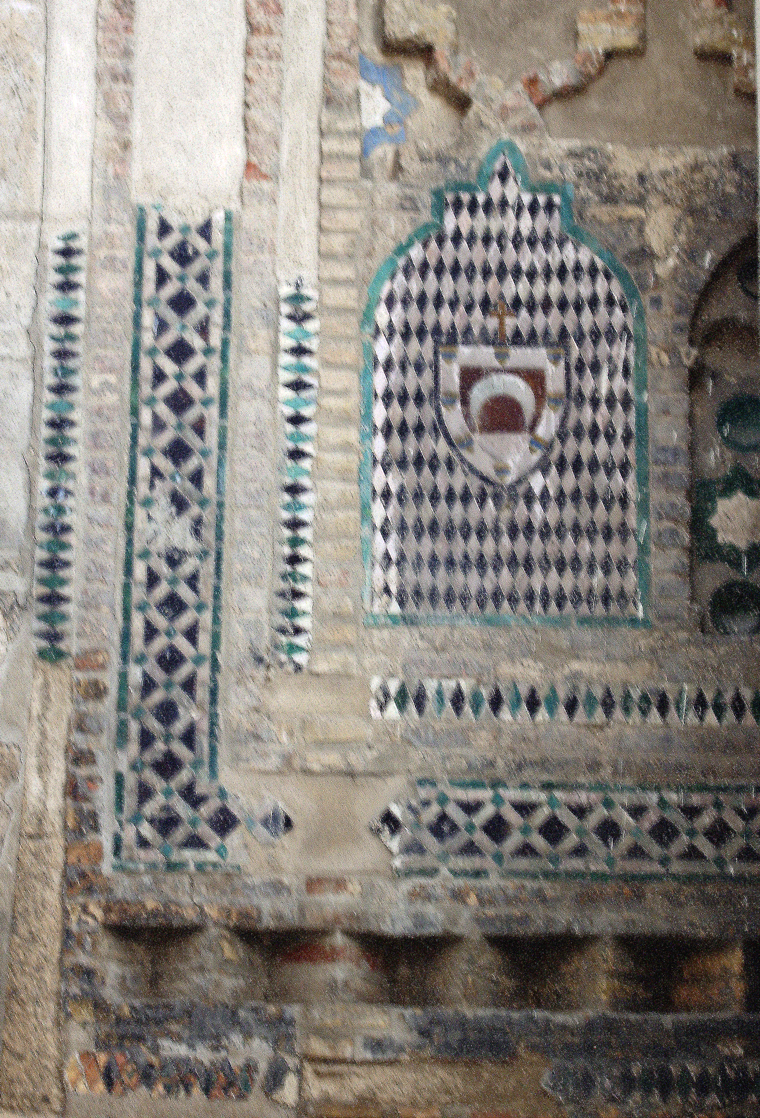 Detalle portada mudéjar de La Seo (Zaragoza, España)